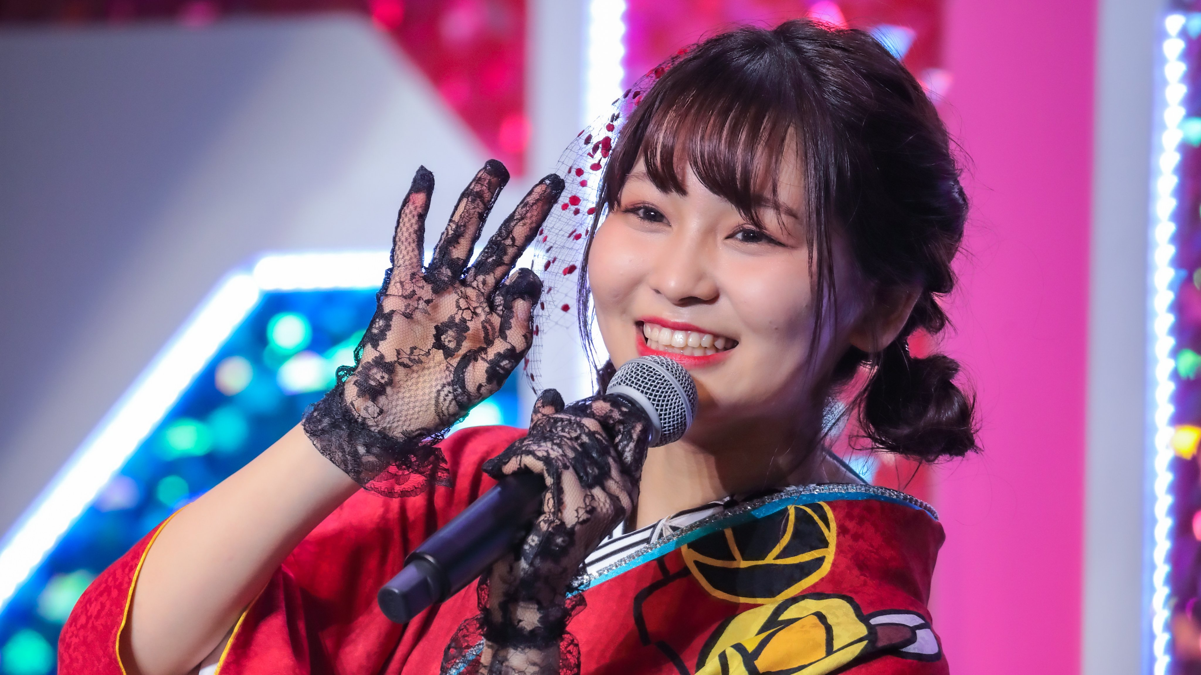 花菜ちゃんミニ成人式